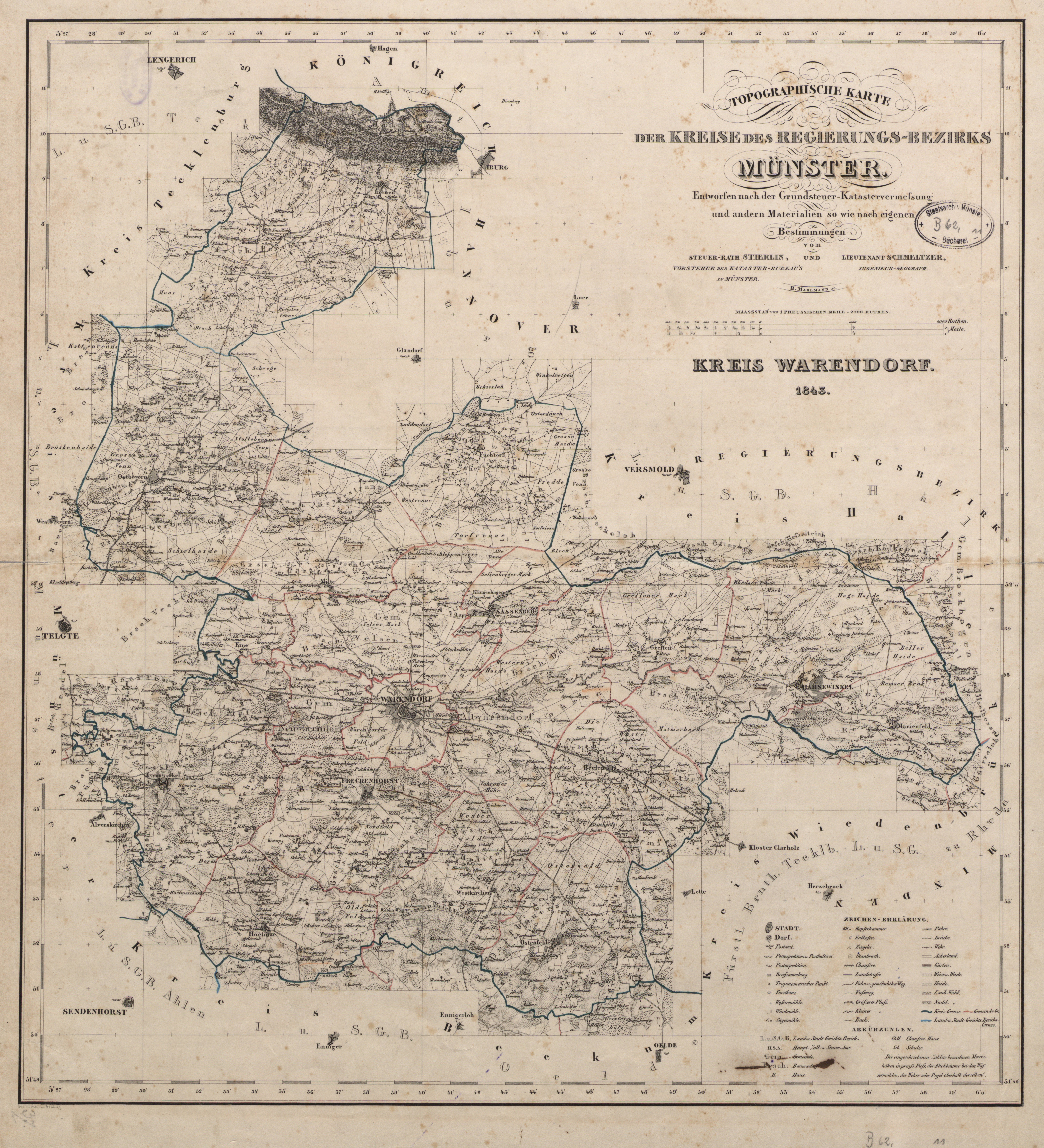 Topographische Karte der Kreise des Regierungs-Bezirks Münster, Blatt 7: Kreis Warendorf, 1843